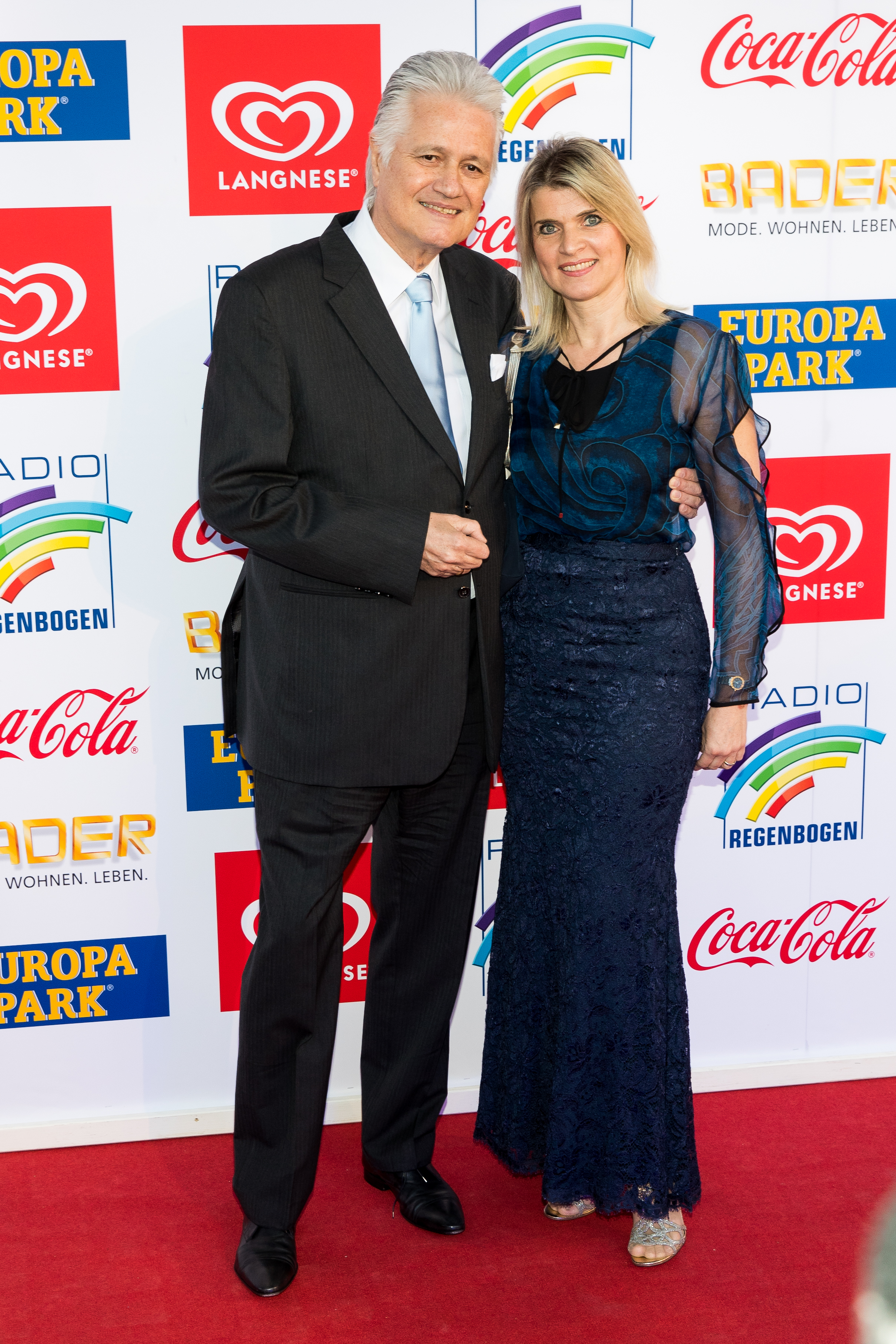 during Radio Regenbogen Award 2017 at Europapark, Rust, Baden-Württemberg, Germany on 2017-04-07, Photo: Sven Mandel